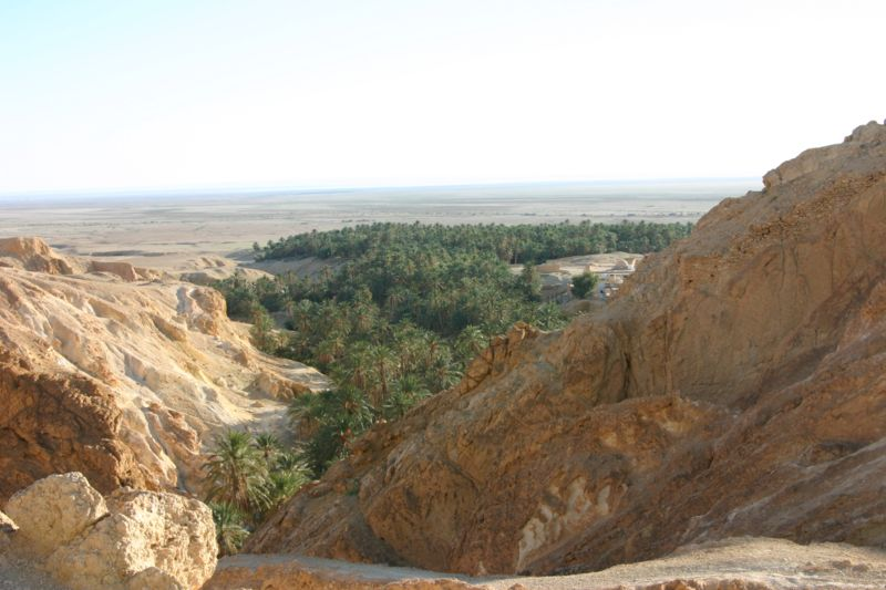 Photographie personnelle prise en décembre 2004, donnant une vue de l'oasis de Chebika en Tunisie.